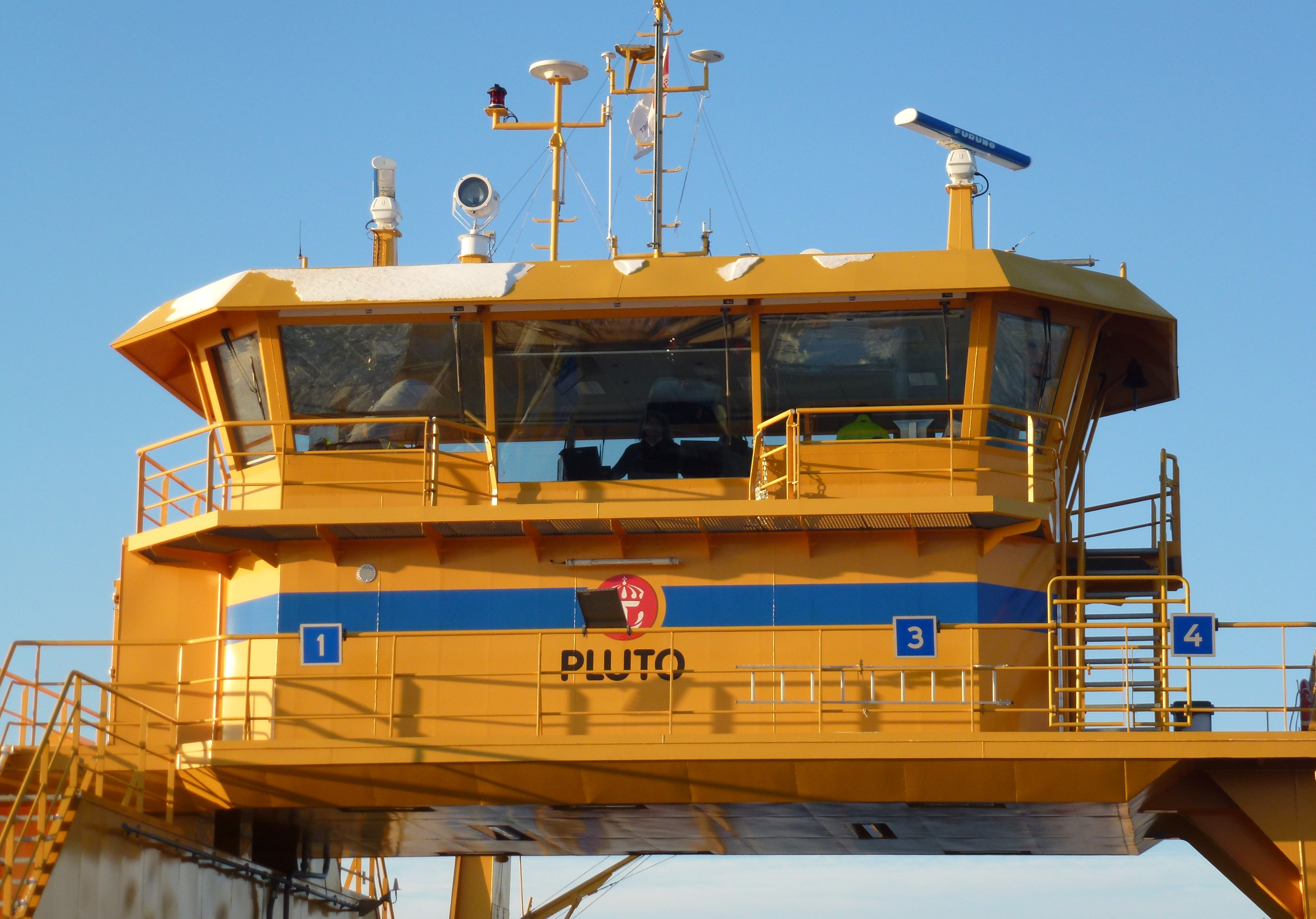 Bryggan på bilfärjan Pluto